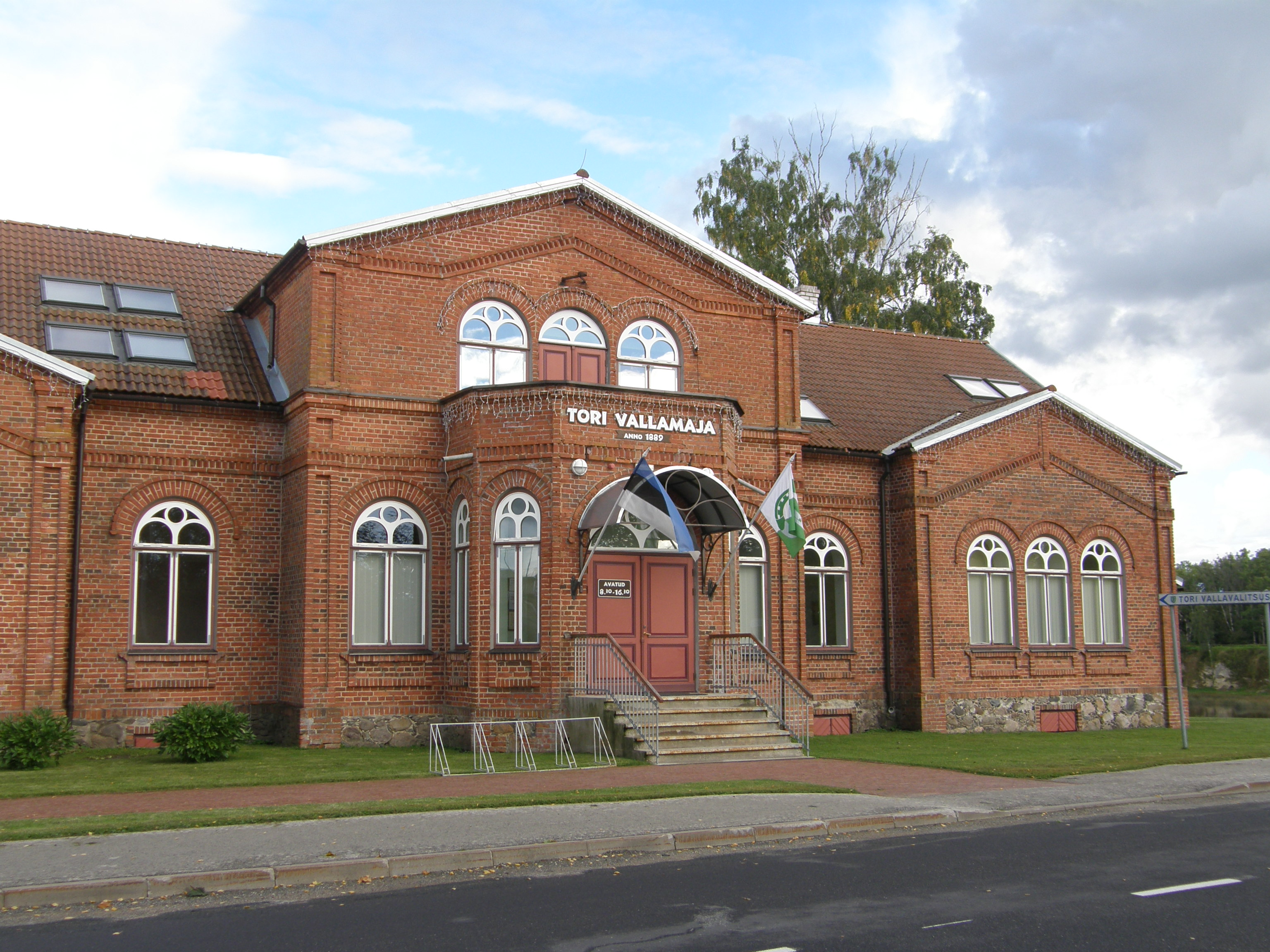 Tori uus vallamaja